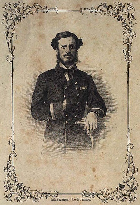 Antonio Carlos de Mariz e Barros